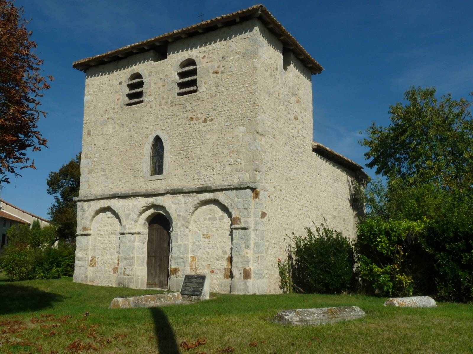 chapelle de Peudry, Saint-Martial (16), France